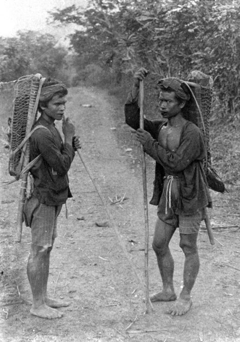 Repronegatief. Copal-inzamelaars bij Wotoe, Toradjalanden, Celebes